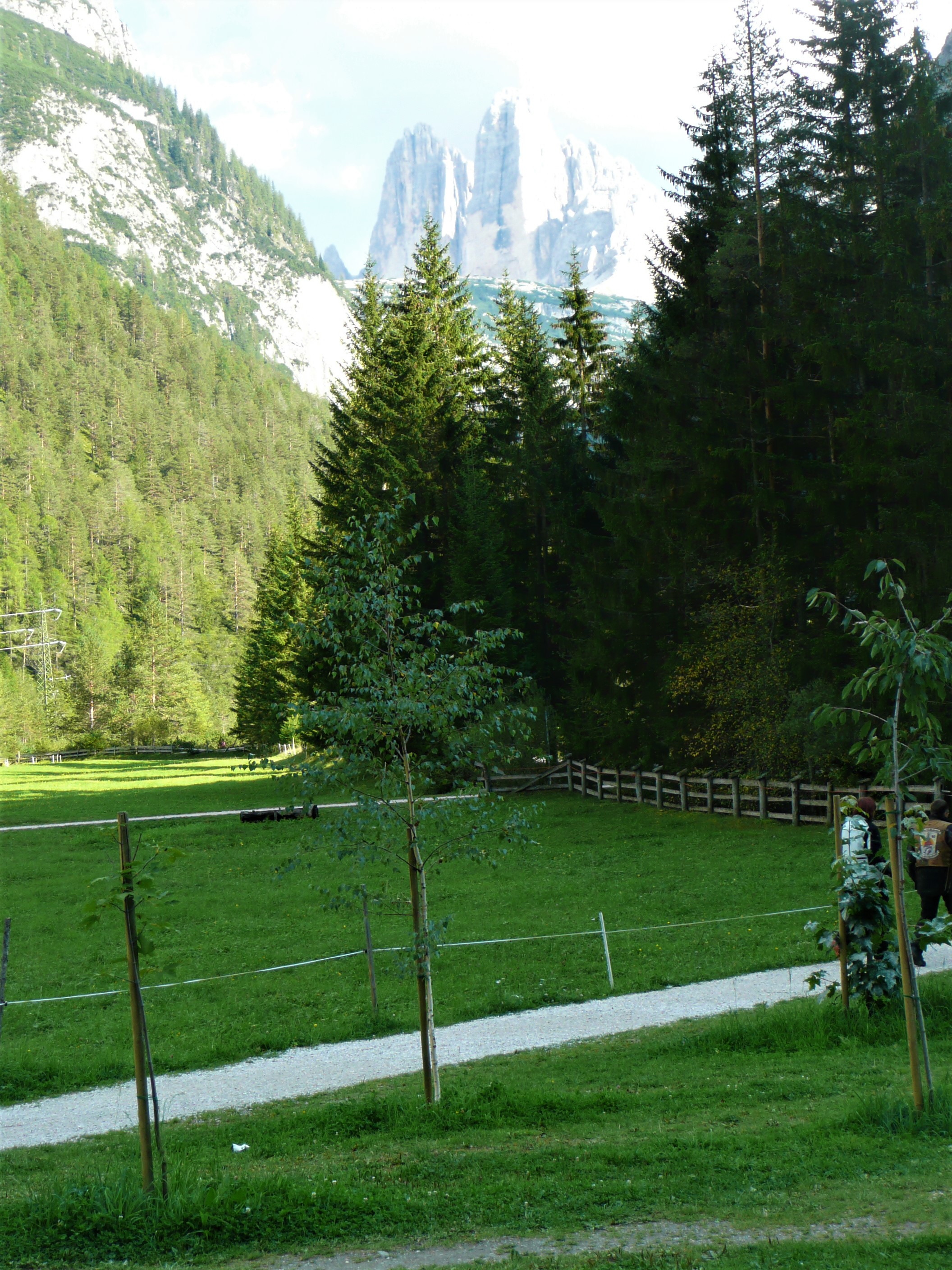 Drei Zinnen aus dem Höhlensteintal aus gesehen